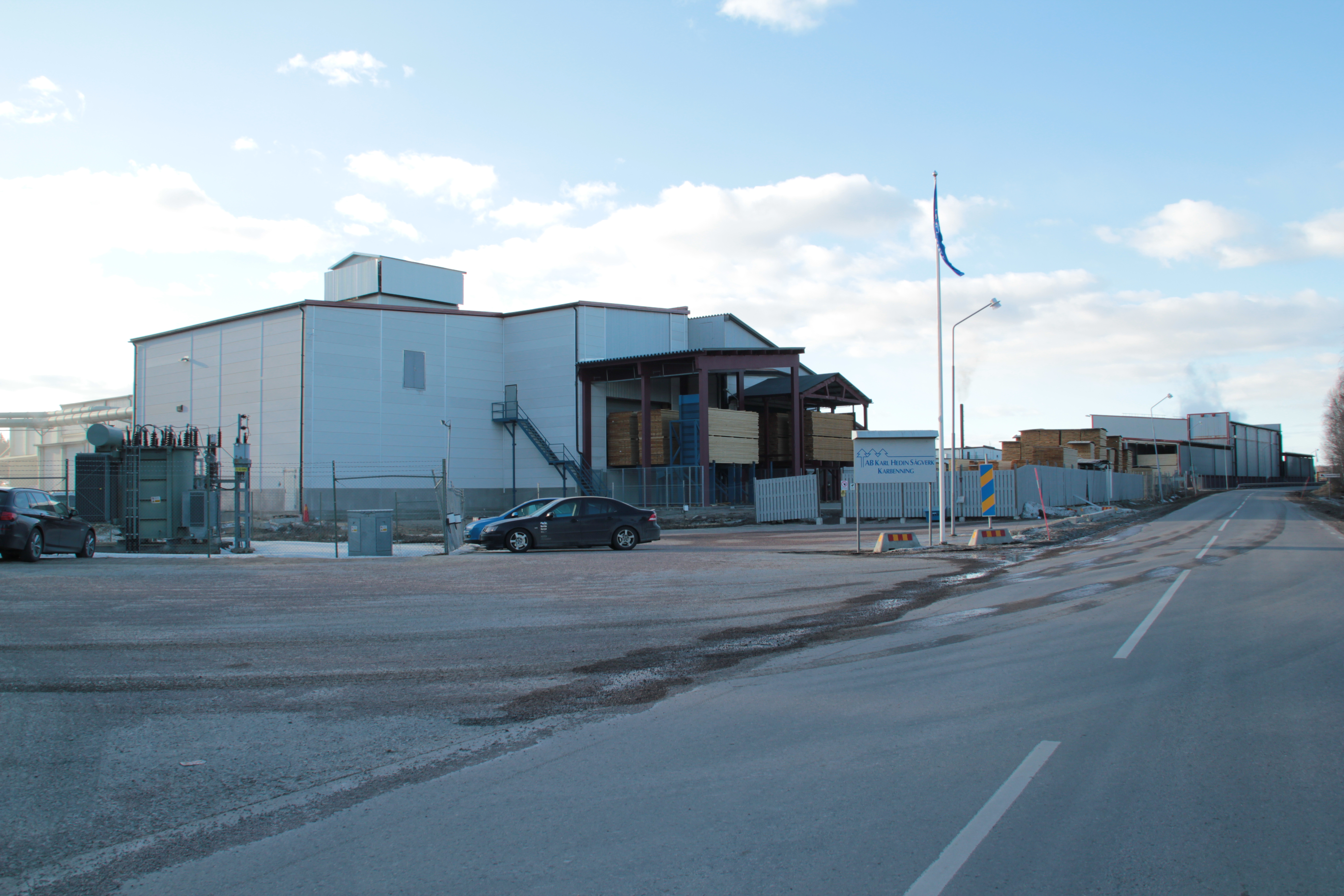 AB Karl Hedins sågverk i Karbenning, Norbergs kommun, Sverige.